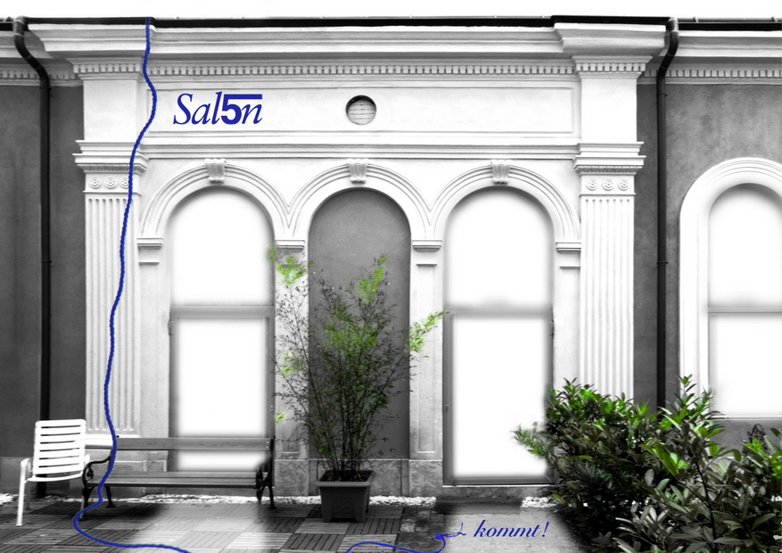 Salon5